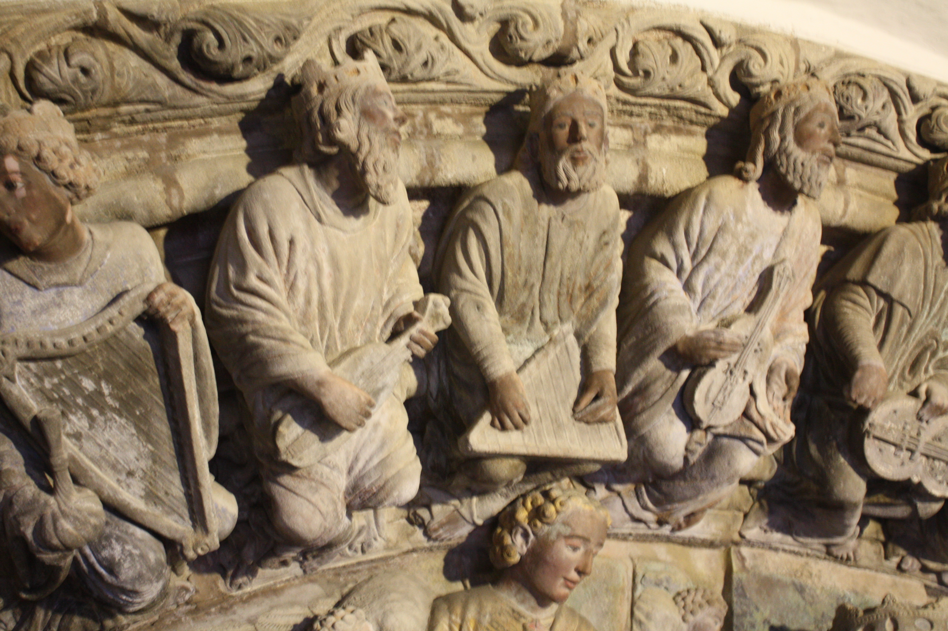 Anciáns músicos da arquivolta do Pórtico da Gloria (nº 9, 10 e 11).